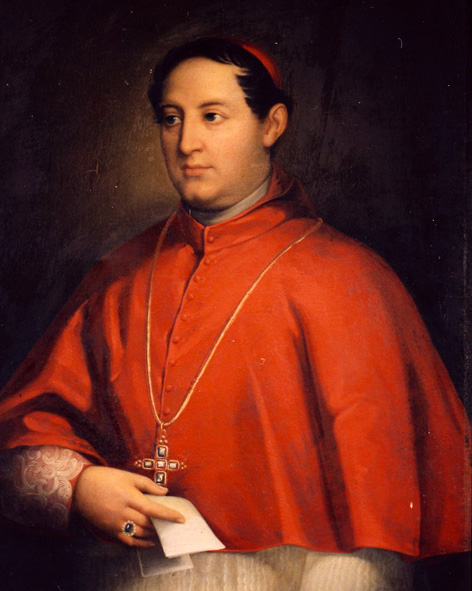 Il cardinale Gaetano Bedini.